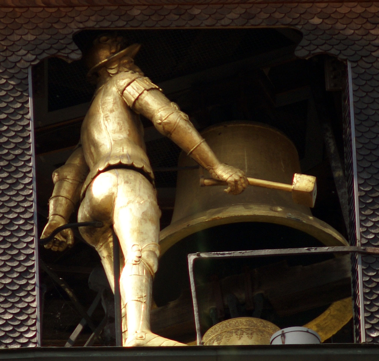 Zytglogge tower in Bern, Switzerland. Architectural detail: bell-striker figure "Hans von Thann".